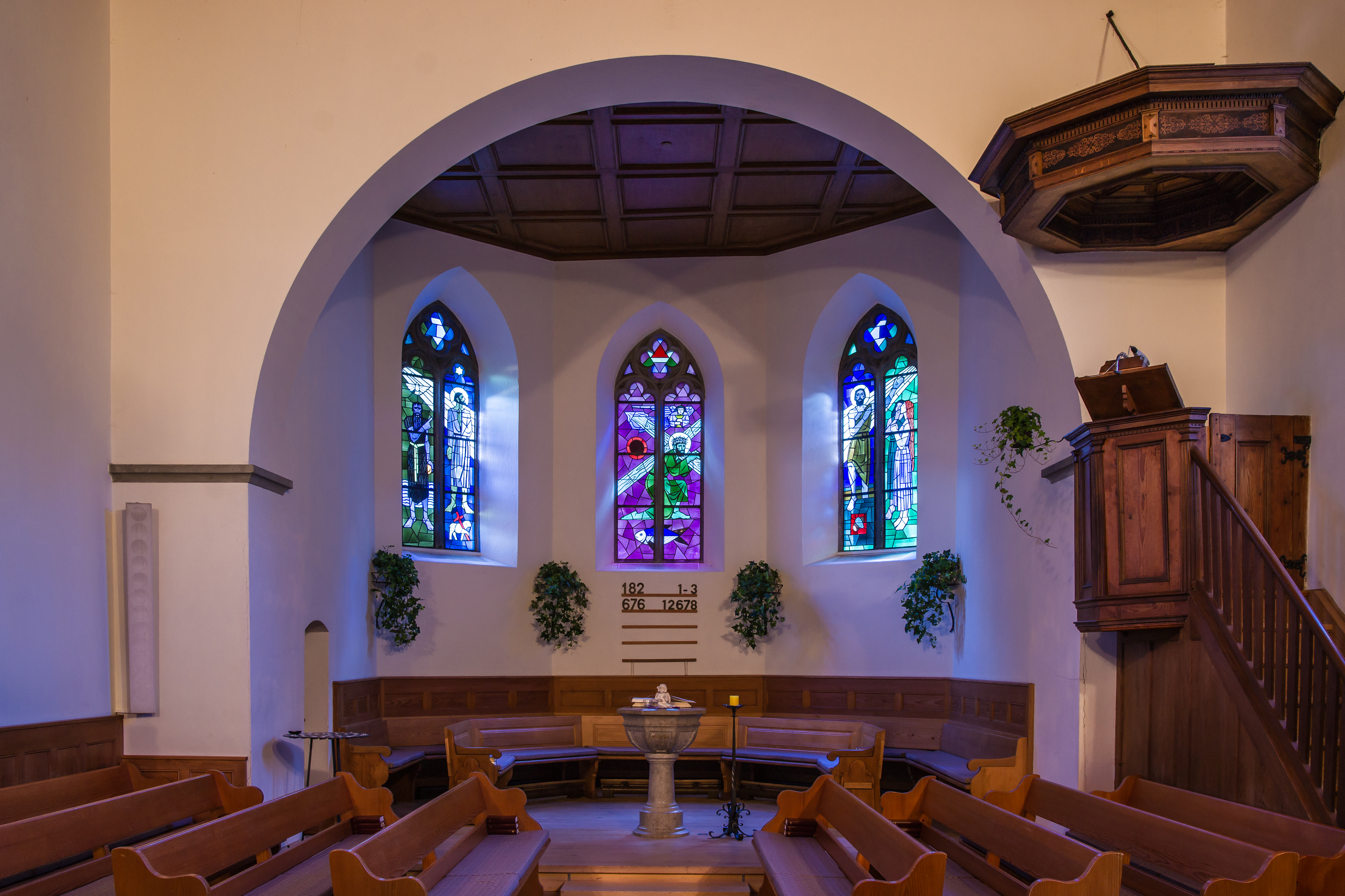 Reformierte Kirche Chorfenster und alte Kanzel